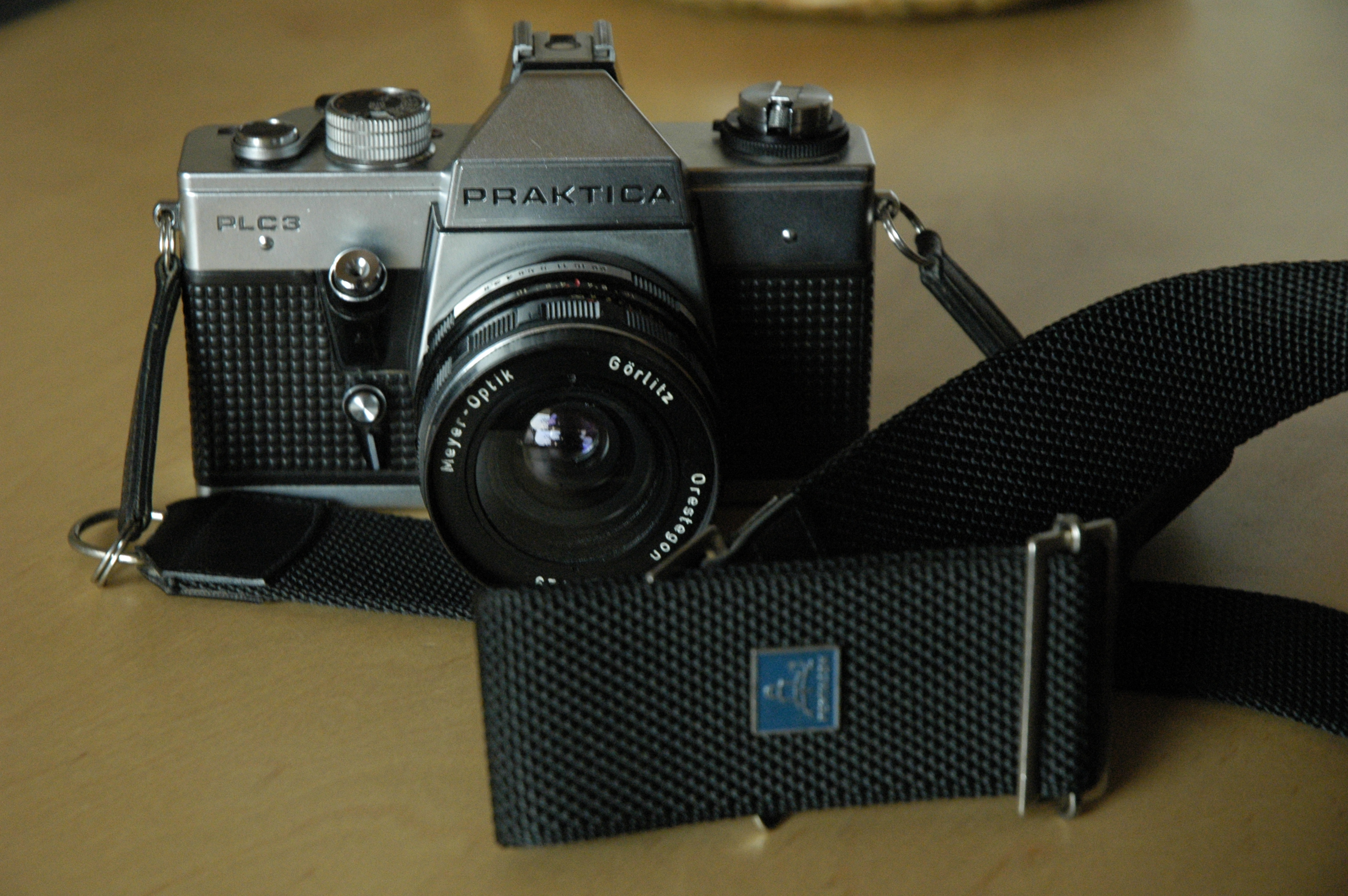 Małoobrazkowy aparat fotograficzny (SLR) Praktica PLC 3